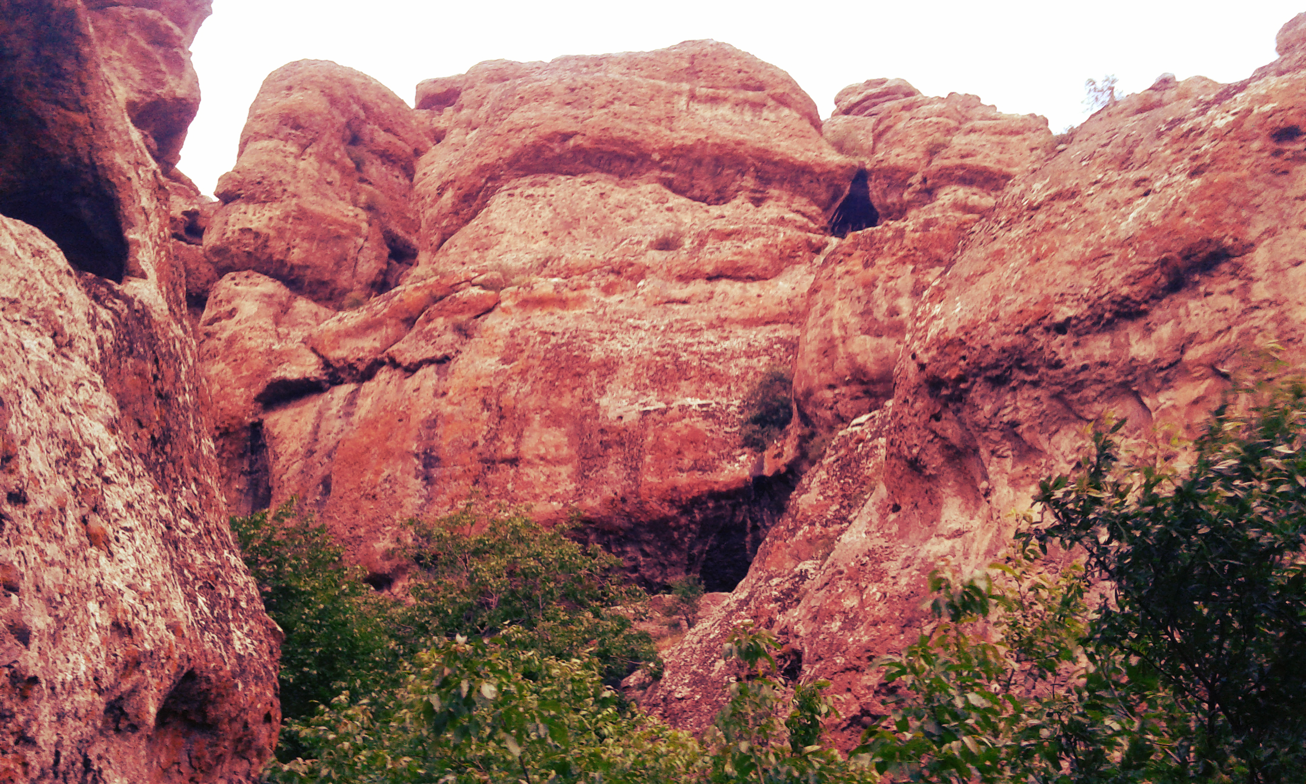 Aṣḥāb al kahf cave in Babek district of Nakhchivan (Azerbaijan).